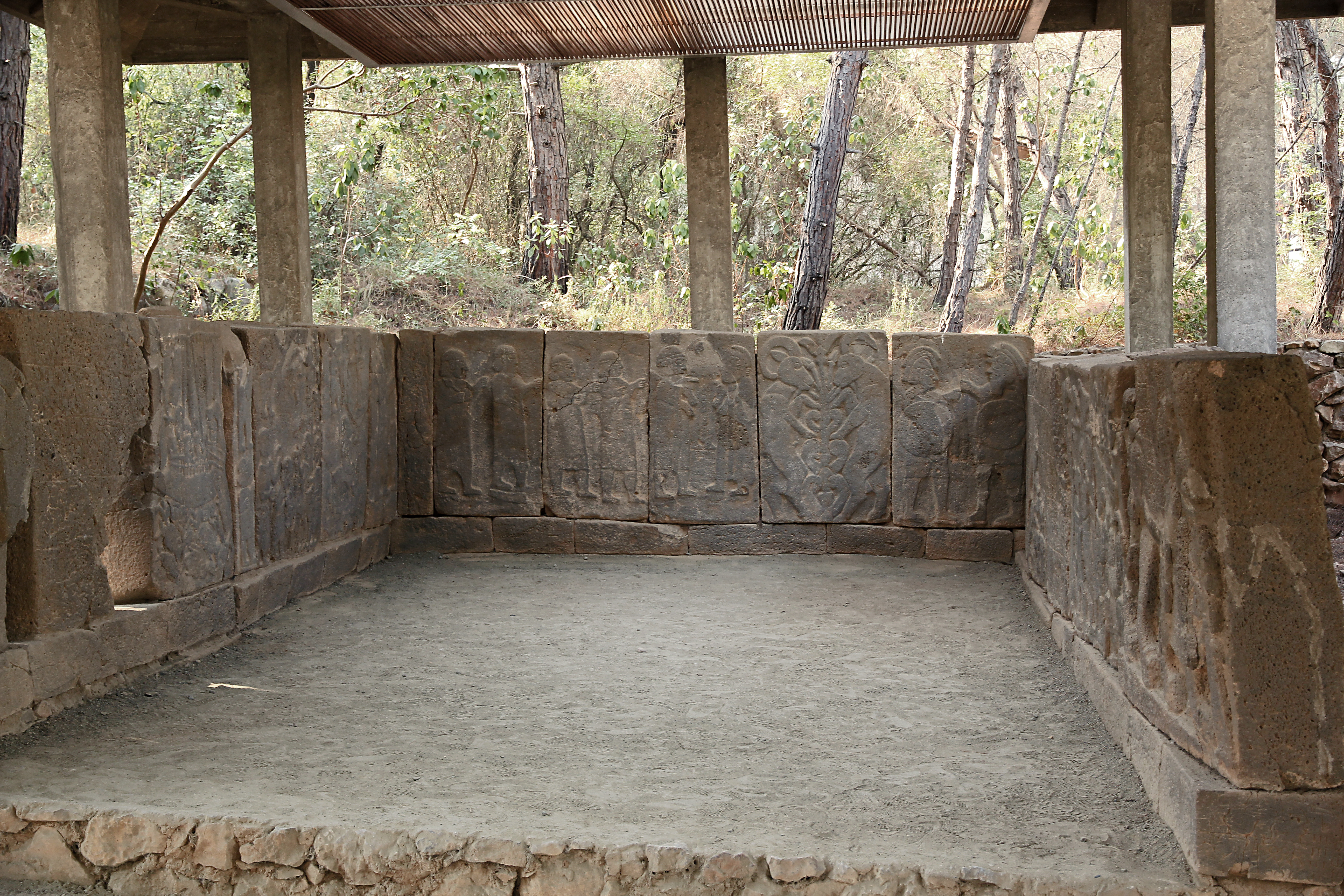 Karatepe (Asatiwataya), neo-hethitischer Fundort bei Osmaniye, Südtürkei, Nordtor, rechte Kammer